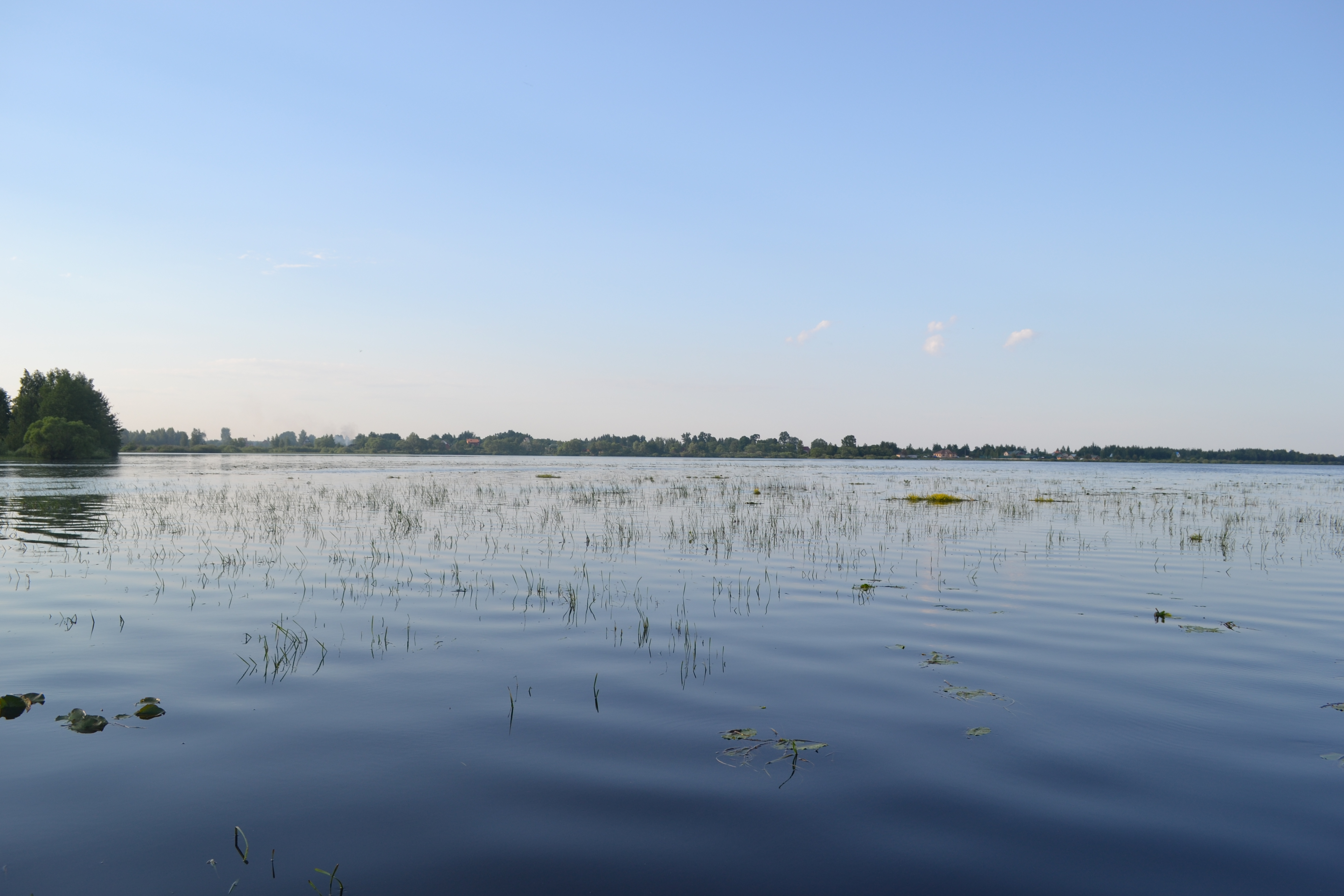 Святое (Филисовский плёс), деревня Филисово, Шатурский район